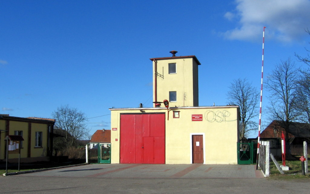 Remiza OSP w Gołańczy Pomorskiej (woj. zachodniopomorskie)